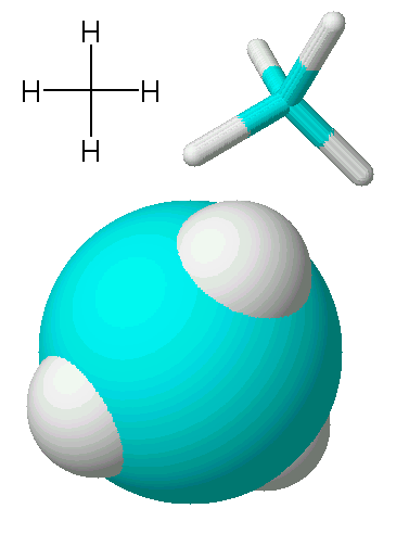 methaan-molecuul. lichtblauw = koolstof, wit = waterstof